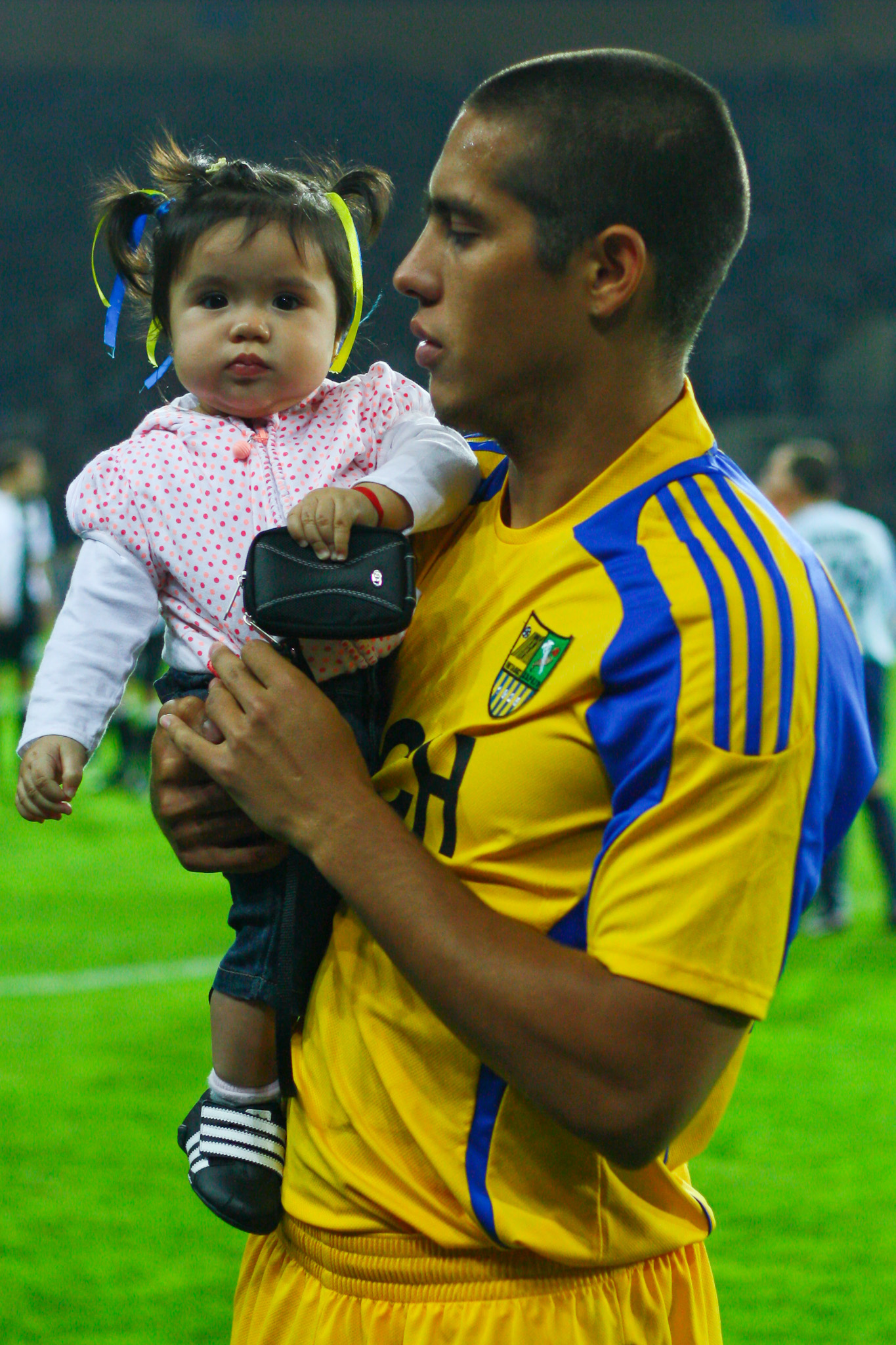 Jonatan Maidana junto a su hija Sol.